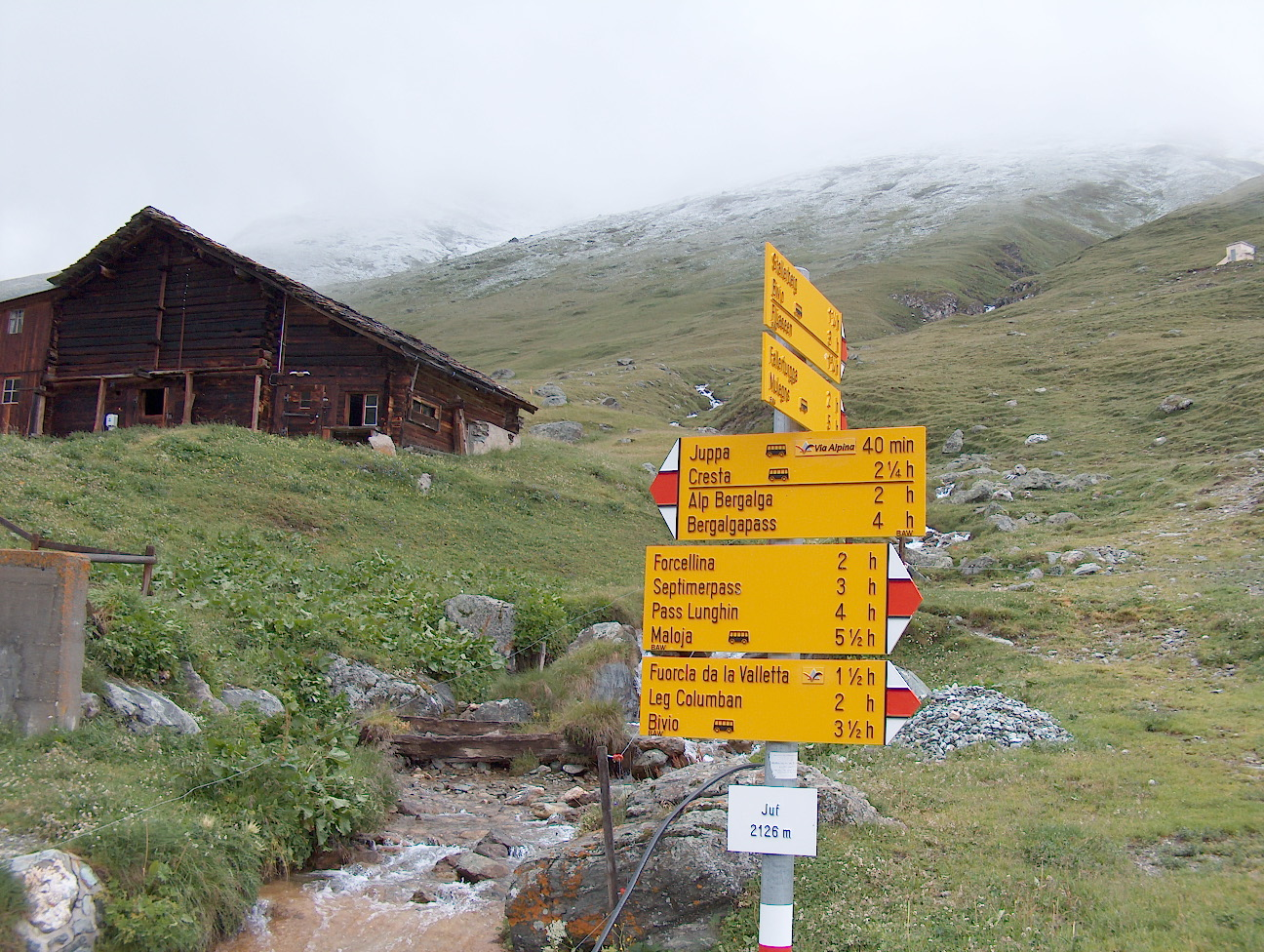 Indicatoare din Juf